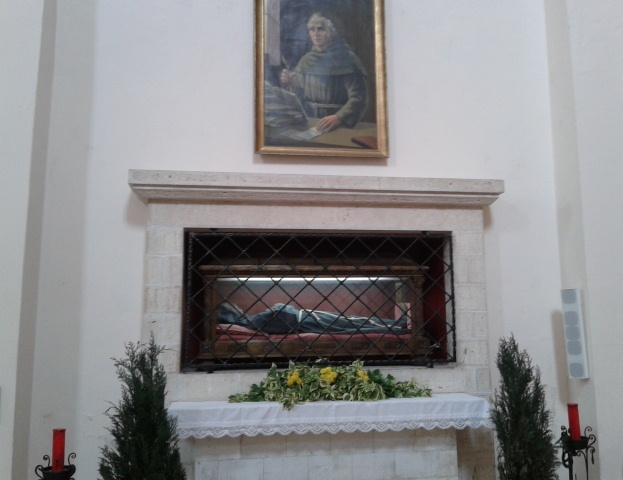 Reliquie Beato Tommaso da Celano (Chiesa di San Francesco)